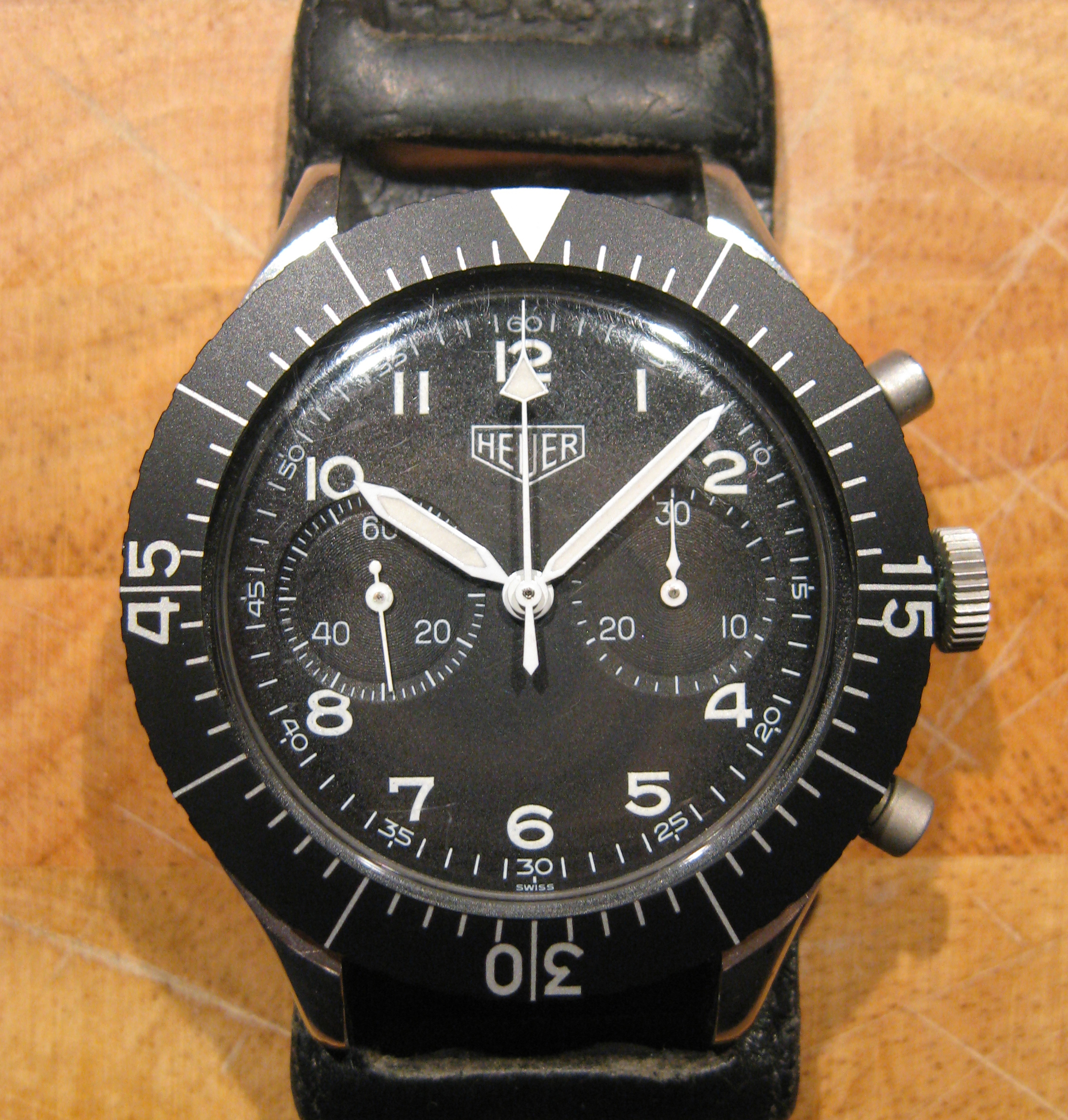 Heuer Fliegerchronograph (Bundeswehr-Luftwaffe) Datum: 19.03.2011 Urheber: M. Pfeiffer alias Benutzer:Gordito1869 Quelle: privates Fotoarchiv des Urhebers